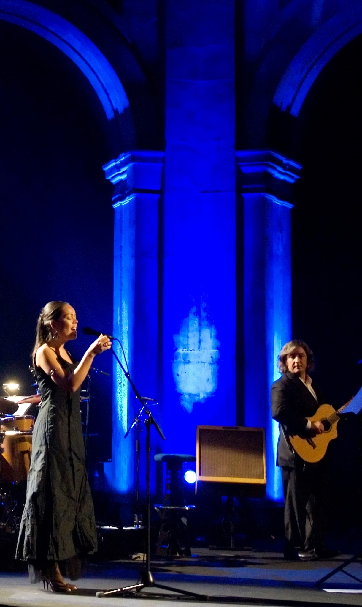 Rita with Pedro Ayres Magalhães, fondateur du fameux groupe portugais Madredeus - Teatro Ibérico, Lisbonne 2008